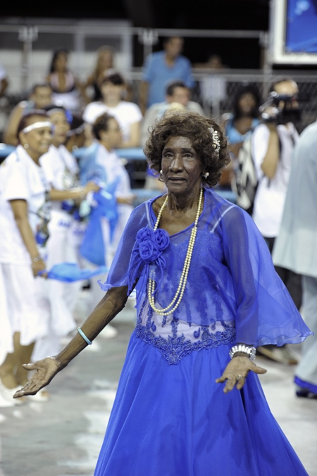 Ensaio técnico da Portela no Sambódromo. Foto: Ricardo Almeida.